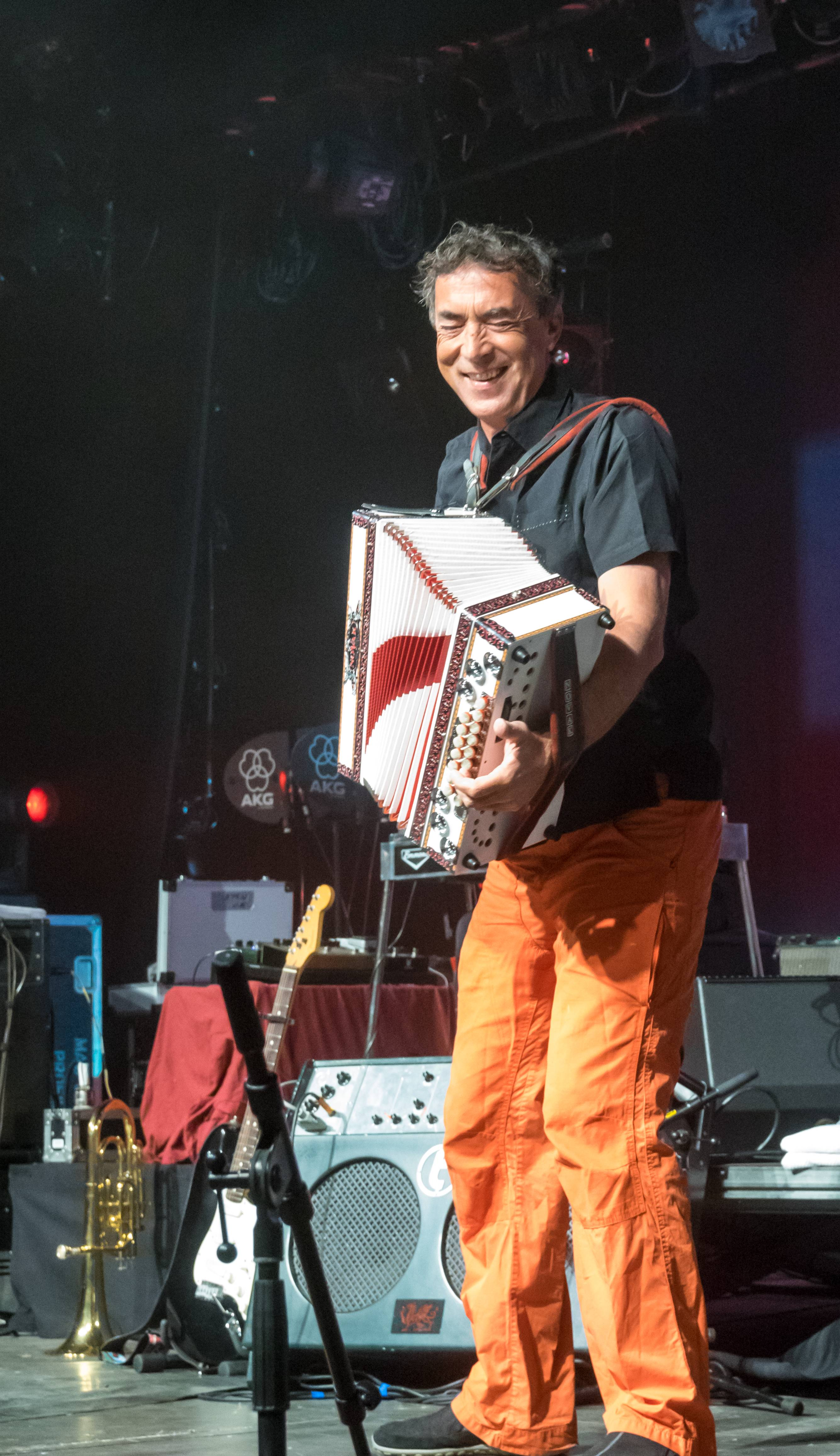 Bilder vom ZMF 2015 Hubert von Goisern